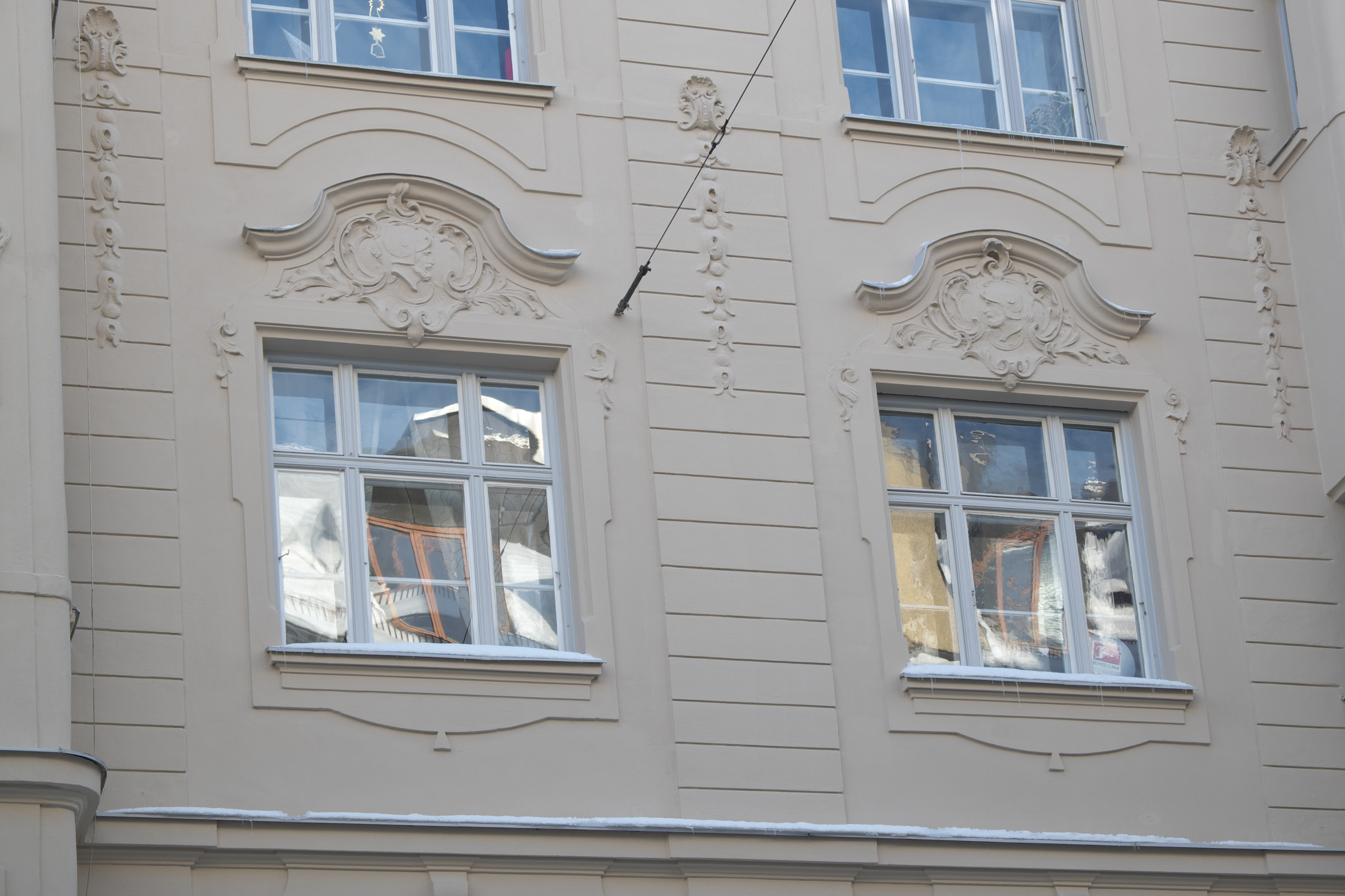 Mietshaus in der Breisacher Straße 4 in Haidhausen im Stadtbezirk Au-Haidhausen in München (Bayern/Deutschland), um 1890/1900